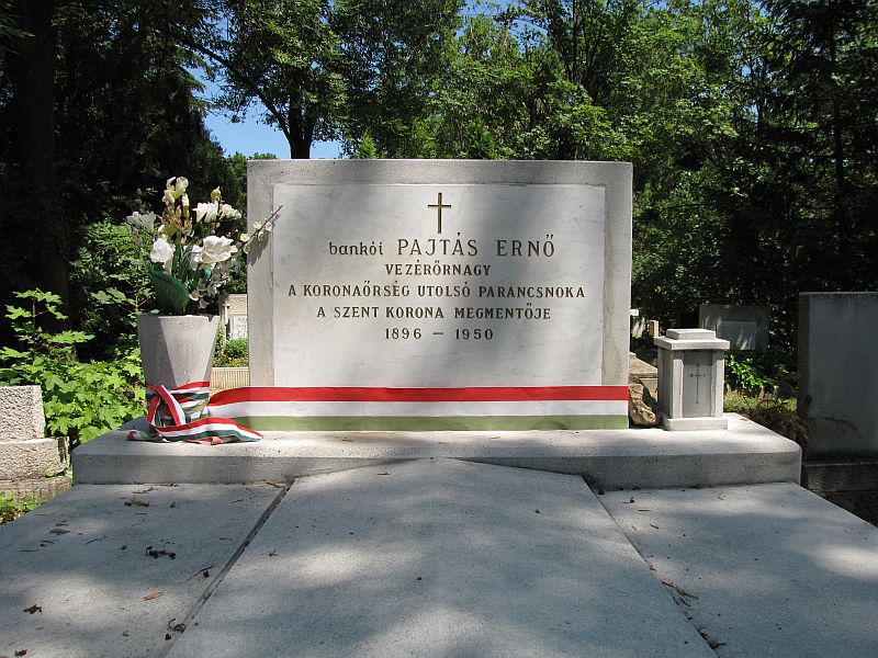 Pajtás Ernő (1896-1950) a koronaőrség utolsó panacsnoka sírja Budapesten. Farkasréti temető: 9/1-1-11/12.